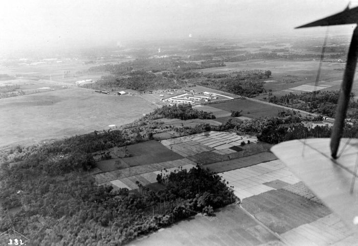 Repronegatief. Luchtfoto van het vliegterrein Andir, ten westen van Bandoeng, Java